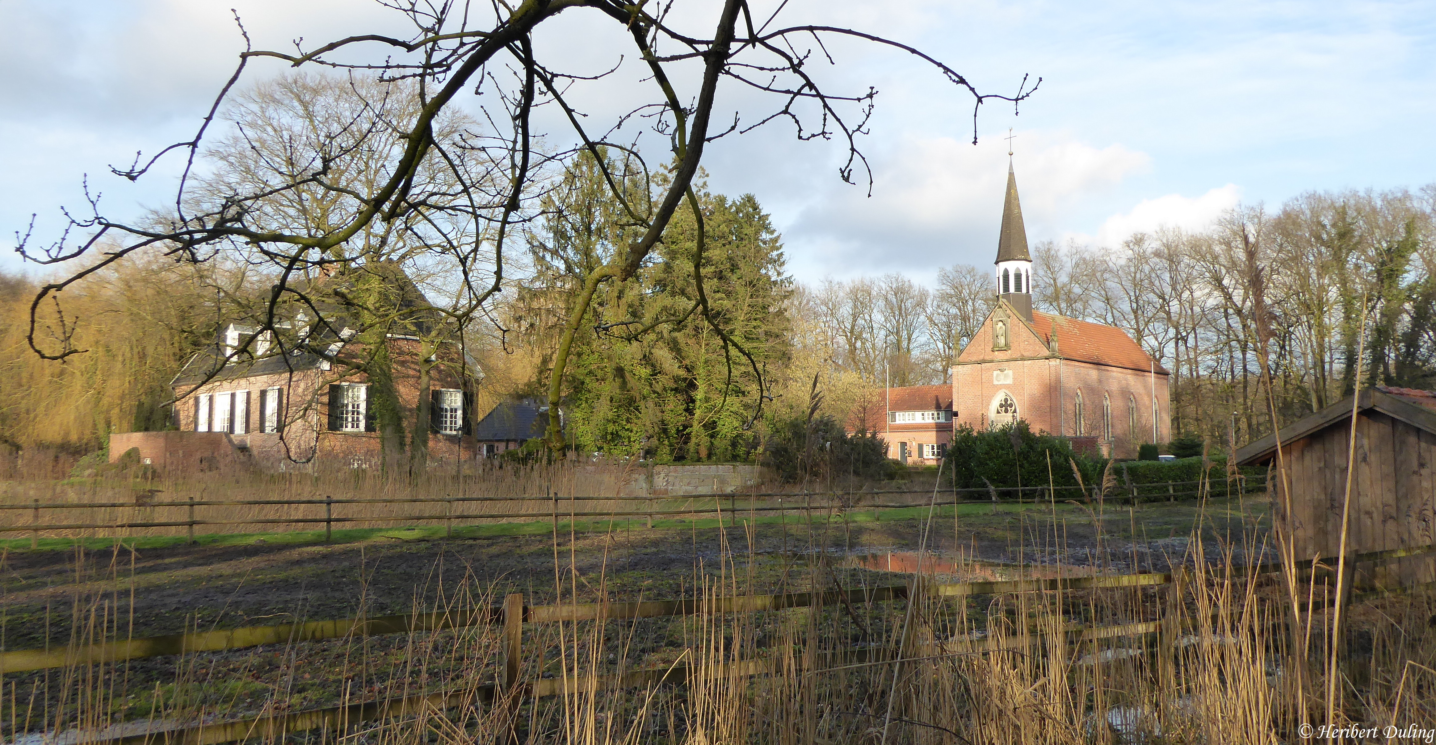 Ehemaliges Gut Brandlecht